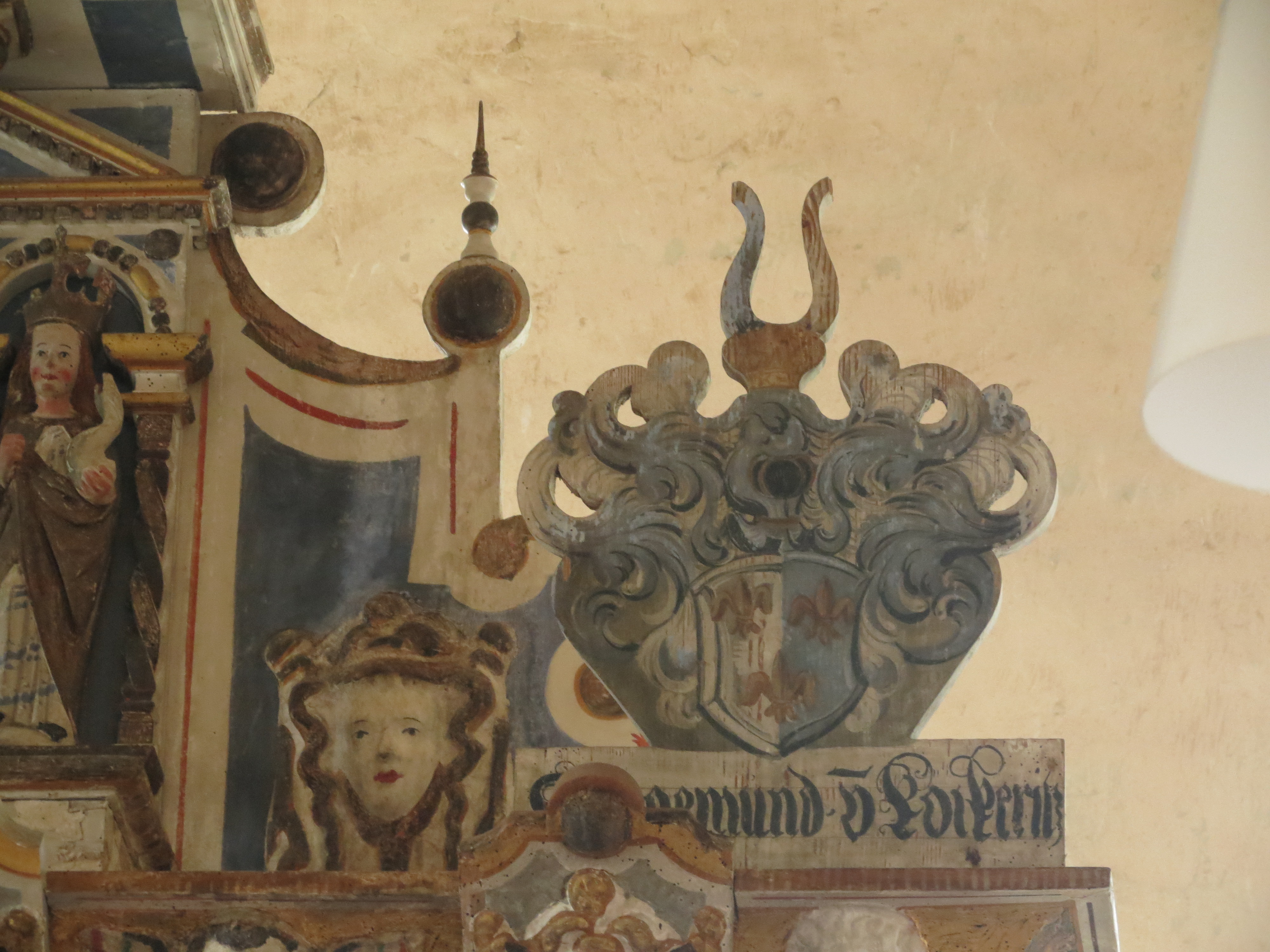 Dorfkirche Laubst, Ortsteil Laubst, Stadt Drebkau, Landkreis Spree-Neiße, Brandenburg, Innenraum, Wappen des Siegmund von Köckritz auf dem Altar